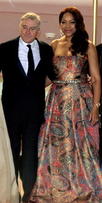 Robert De Niro et son épouse Grace Hightower au festival de Cannes